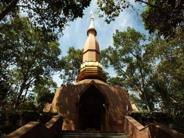 เจดีย์พิพิธภัณฑ์ ท่านพระอาจารย์เสาร์ กนฺตสีโล พระปรมาจารย์สายพระกรรมฐาน